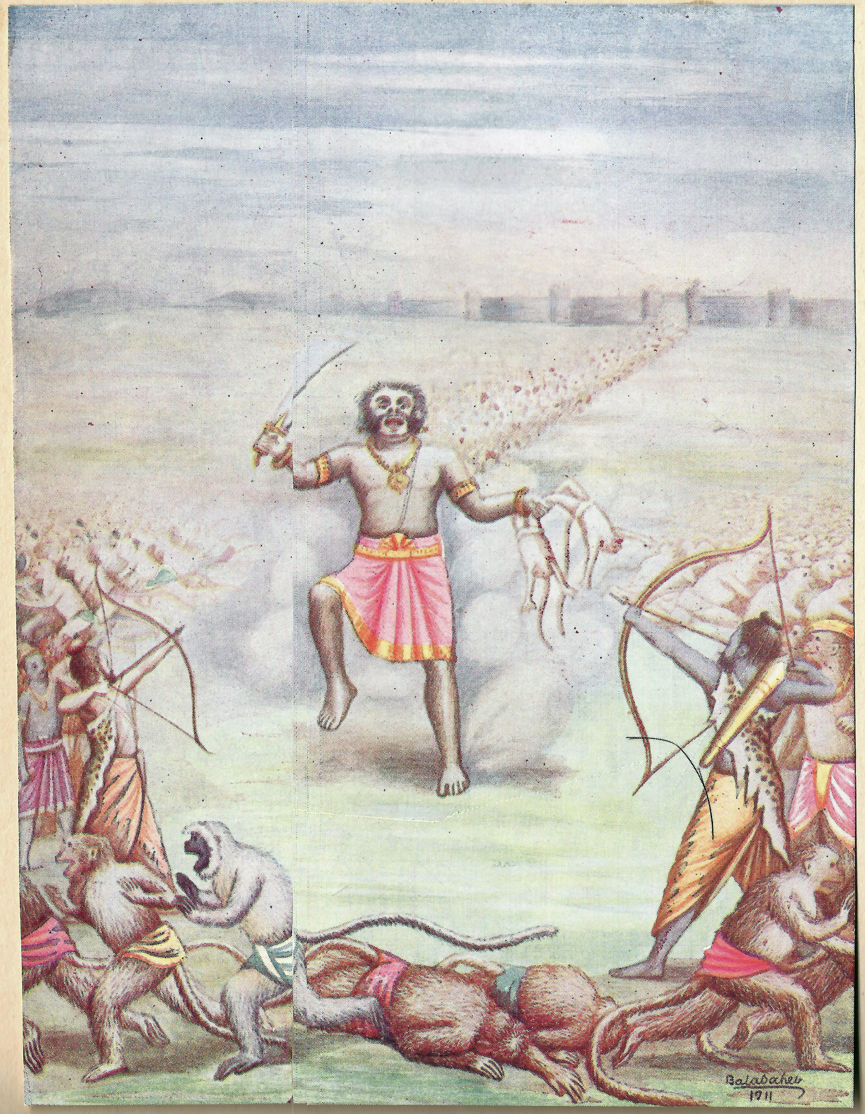 From: Kumbhakarna Enters Warfront Painting by Balasaheb Pandit Pant Pratinidhi Source of Picture: Chitra Ramayana by Ramachandra Madhwa Mahishi, Illustrated by Balasaheb Pandit Pant Pratinidhi, 1916